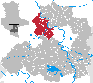 Verwaltungsgemeinschaft Westlicher Saalkreis in Sachsen-Anhalt - Saalekreis